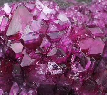 foto da collezione Kammererite turca